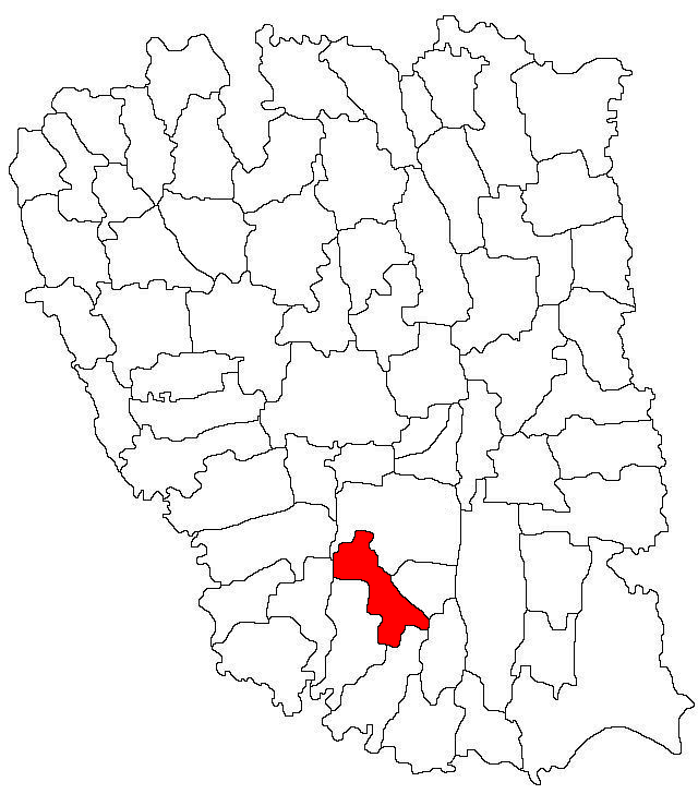 Categorie:Hărţi ale judeţului Galaţi